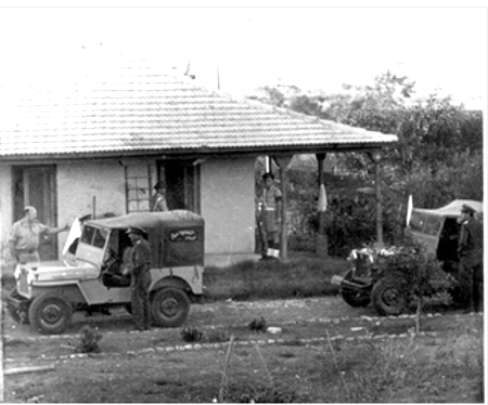 משא ומתן בן צה"ל לצבא מצרים הנצור בכיס פלוג'ה, "בבית נאצר"- הבית בגת בו נערך המפגש, ב- 11-11-1948. החייל העומד ליד הג'יפ הימני הוא גמאל עבד אל נאצר, לימים נשיא מצרים.